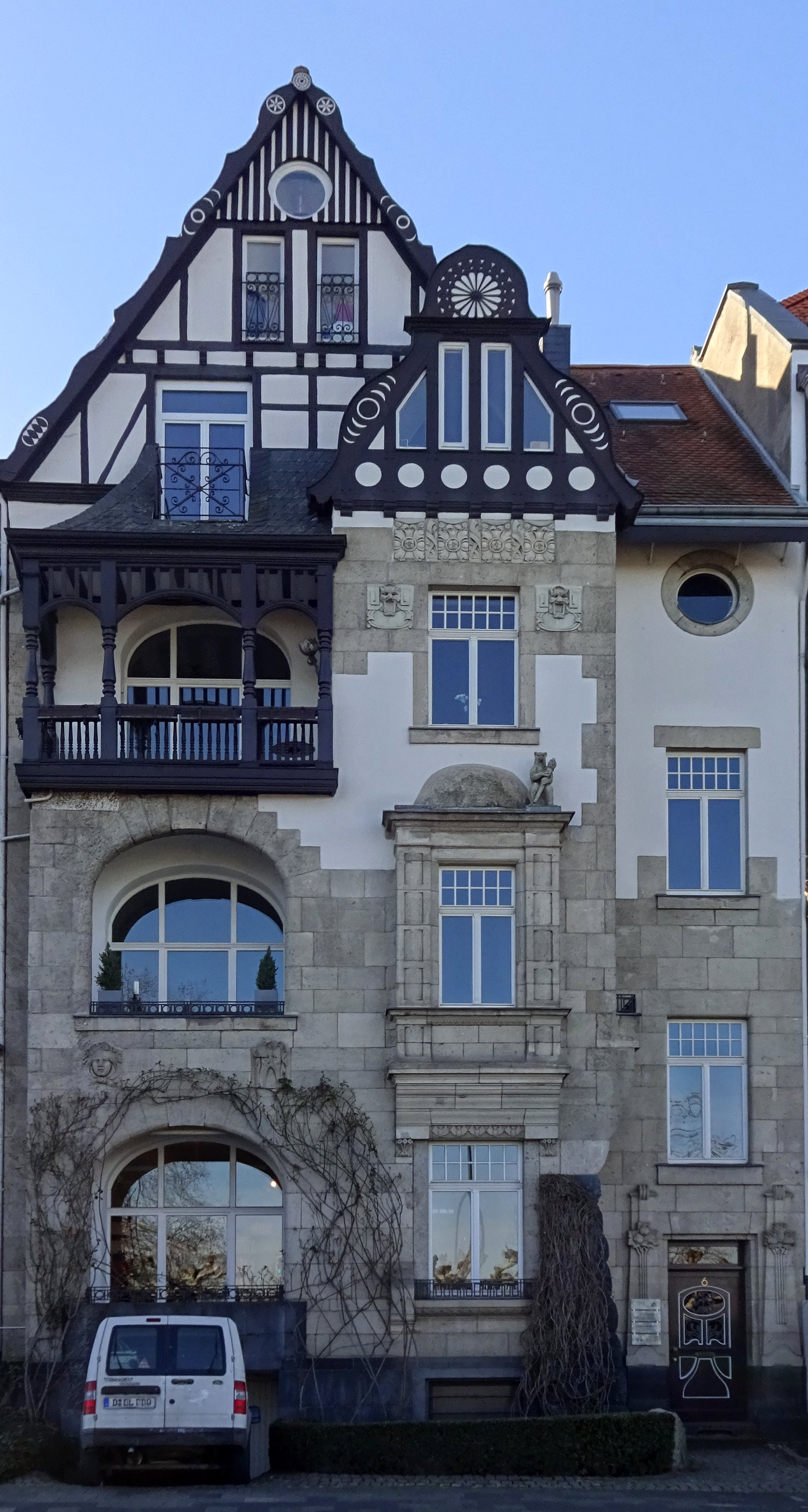 Haus Kaiser-Friedrich-Ring 6, Düsseldorf-Oberkassel, Architekt Theodor Blazer, erbaut 1903